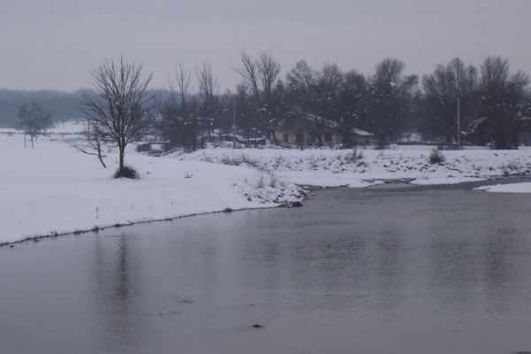 El río Lozoya en invierno